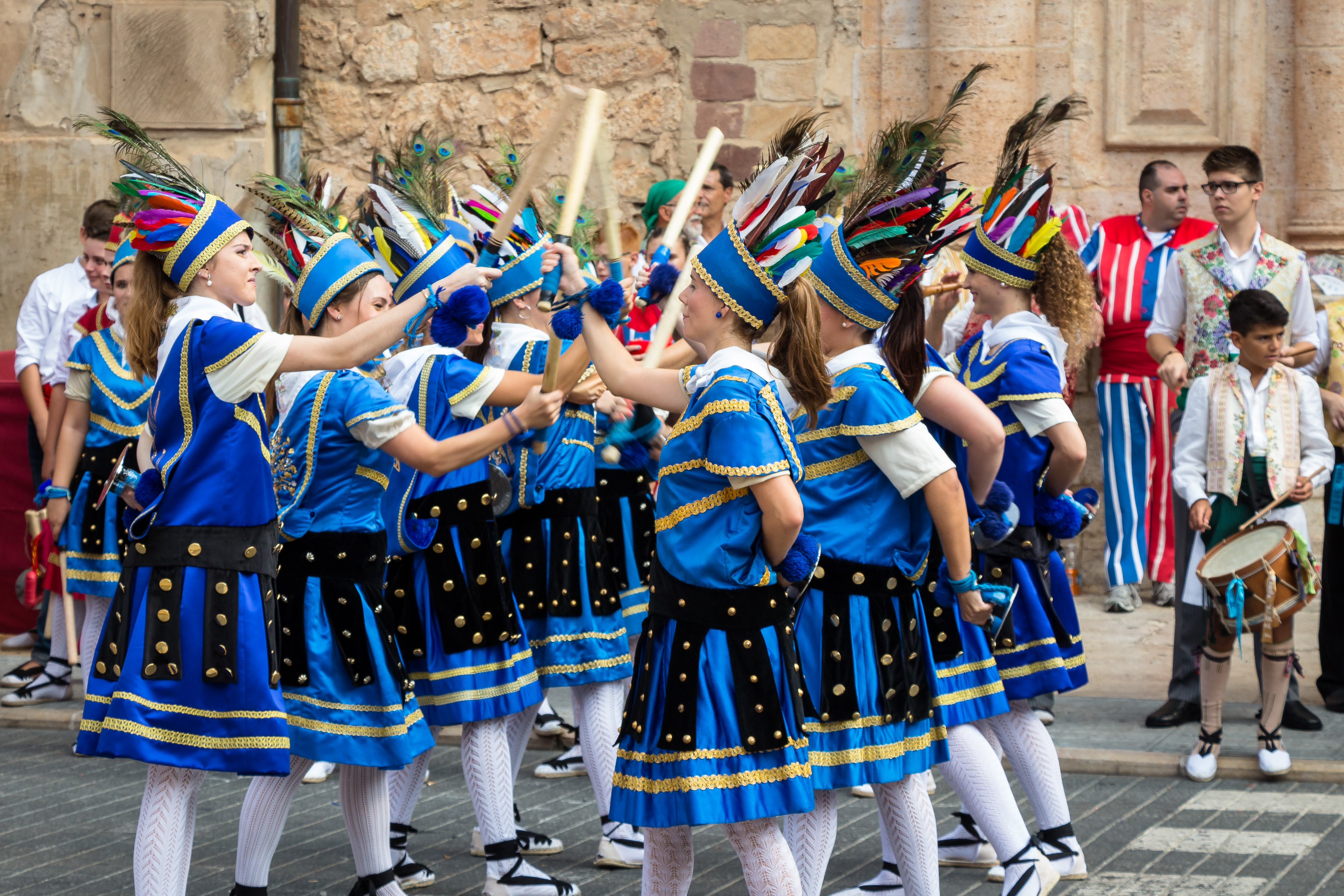 Els Bastonets es un enérgico baile de orígenes guerreros. Aquí se puede ver al grupo femenino que apareció en 1980 para bailar junto a los grupos masculinos ya existentes. This is a photography of a Folklore festival in Spain (Wikidata id Q3290365).